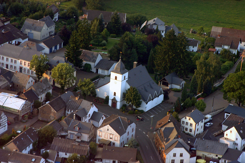 Mehrener Kirche